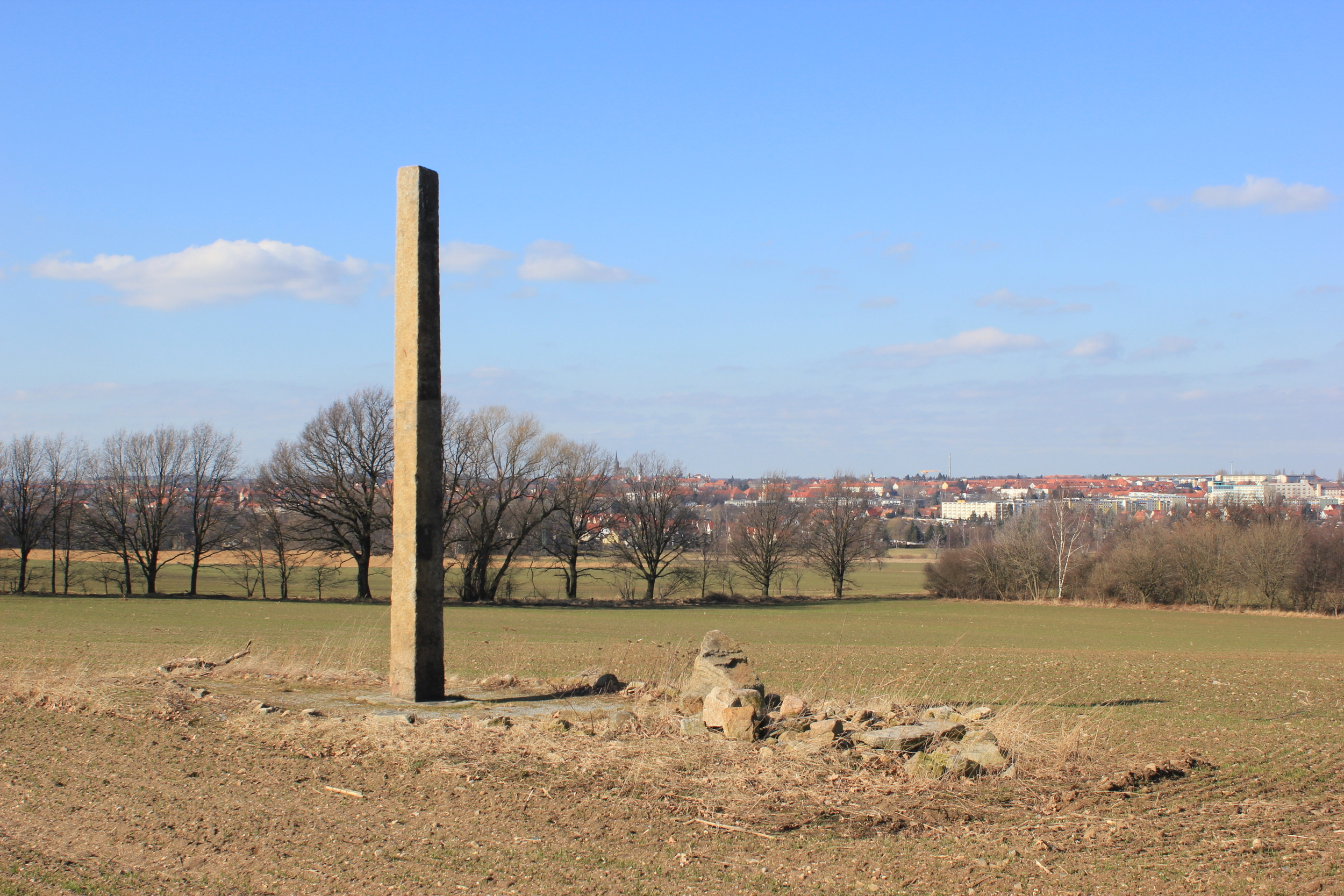 Hornjoserbsce: Wuričanski stołp (zapisany kulturny pomnik).